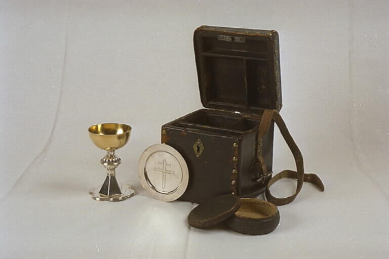 Sockenbudstyg. Motiv: Nederluleå kyrka Nyckelord: Riksintressen, Världsarv Kategori: (06A) GudstjänstutensilierSockenbudstyg.